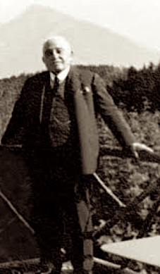 Grigore Antipa fotografiat de Nicolae Leon (circa 1930)